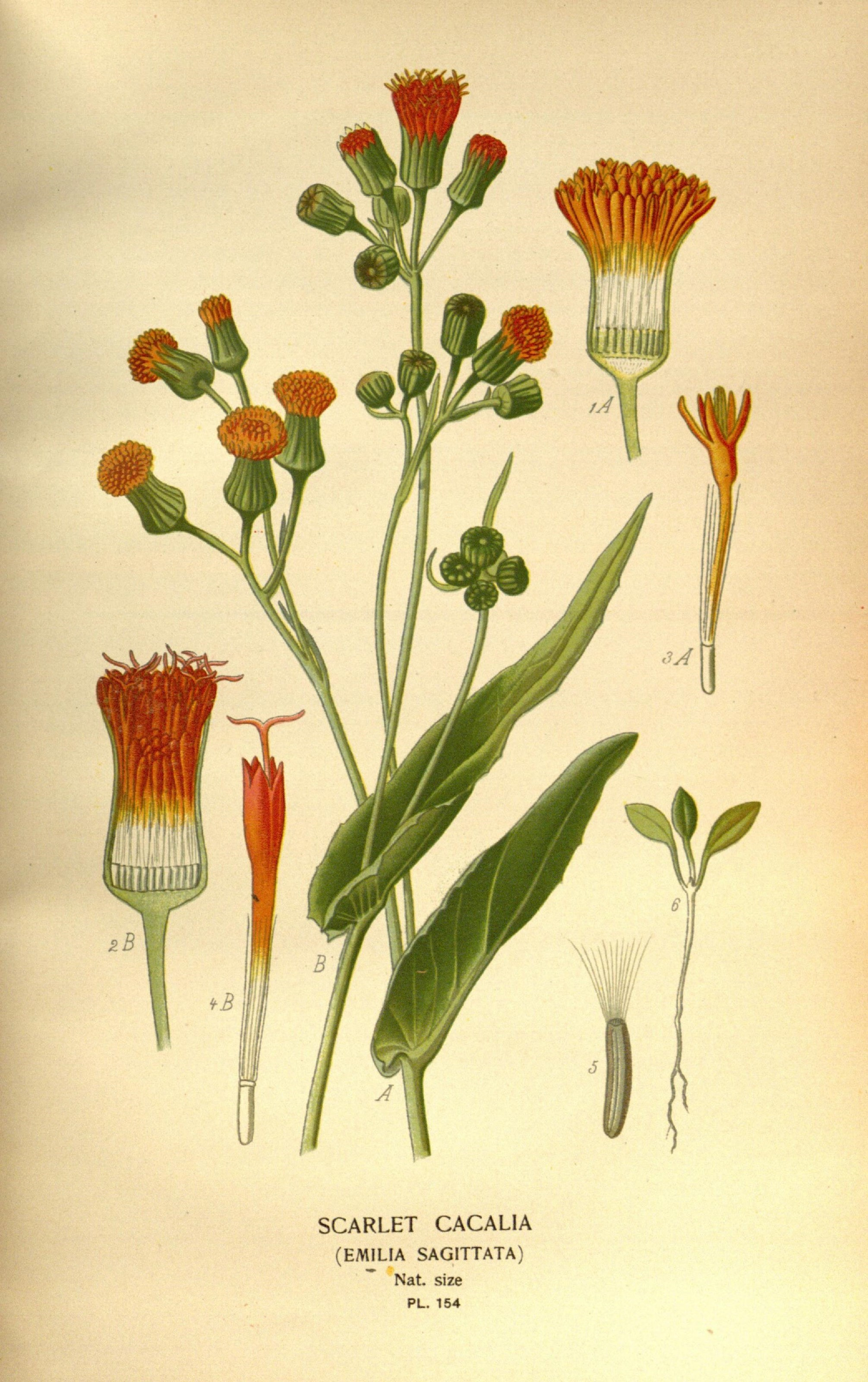 SCARLET CACAL1A (EMILIA SAGITTATA)